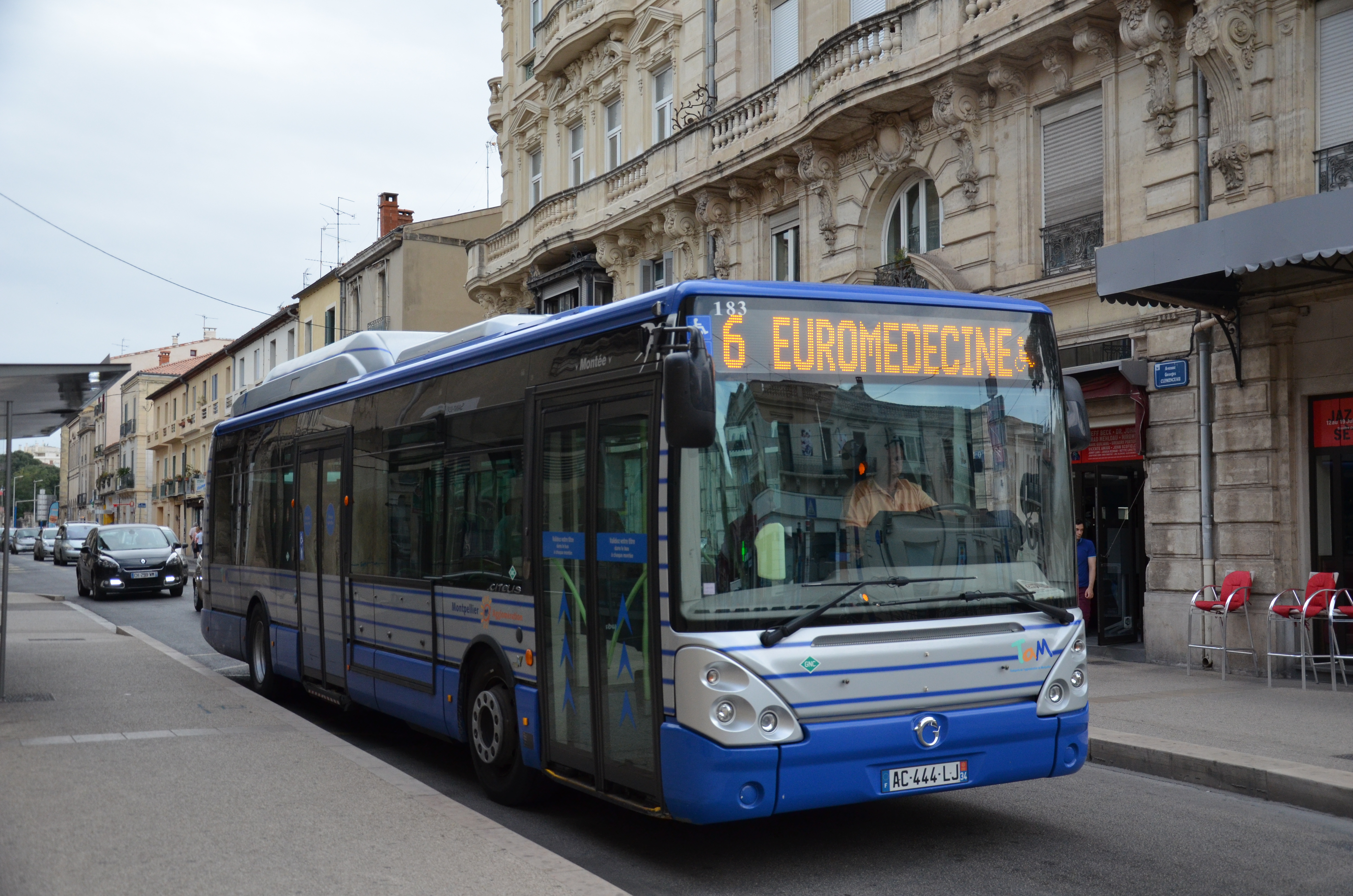 Irisbus Citelis 12 n°183 à Saint-Denis, sur la ligne 6 du réseau TAM de Montpellier.